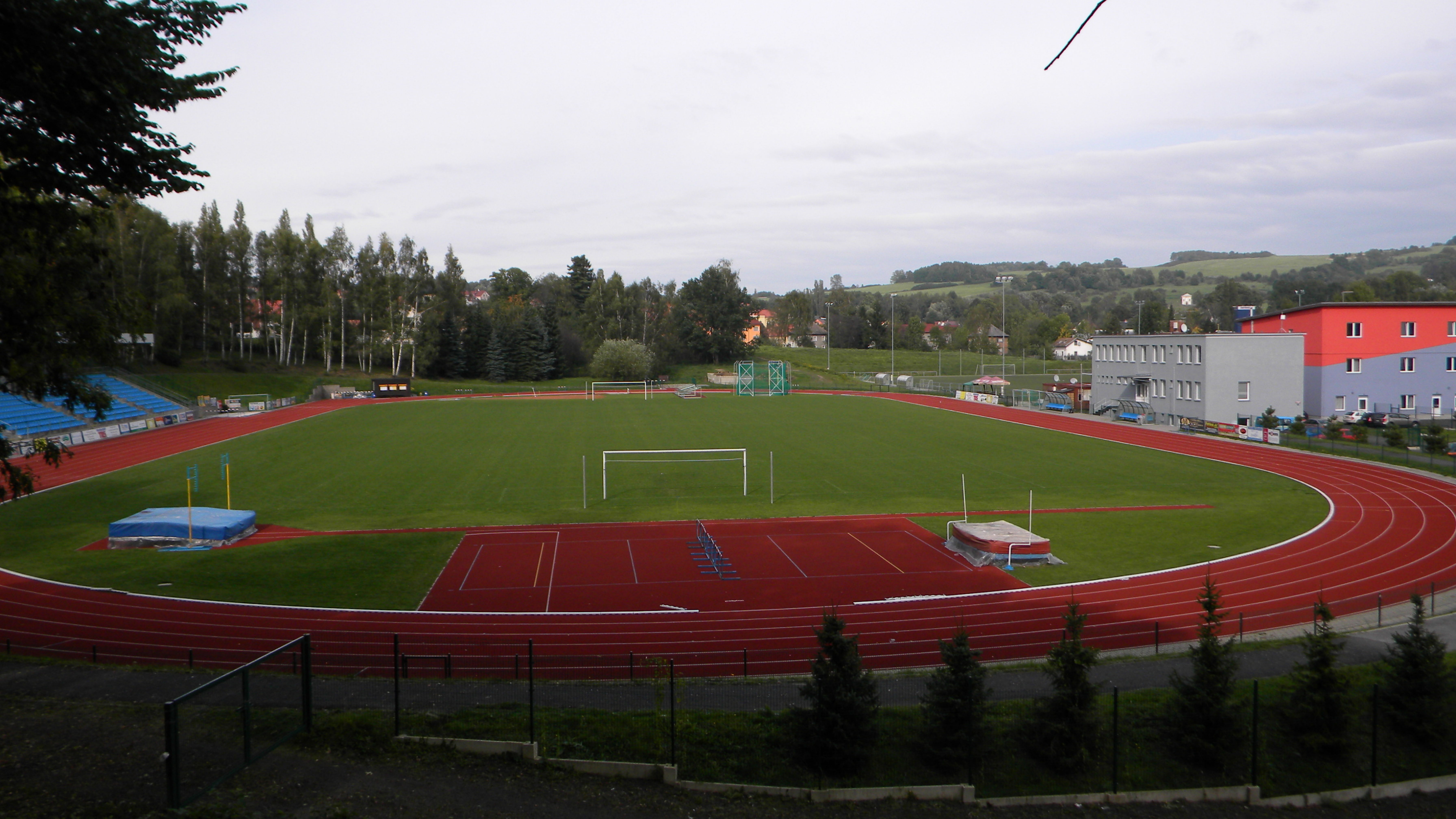 SK Slovan Varnsdorf, Moravská 2688, 40747, Varnsdorf, okres Děčín, Česká republika